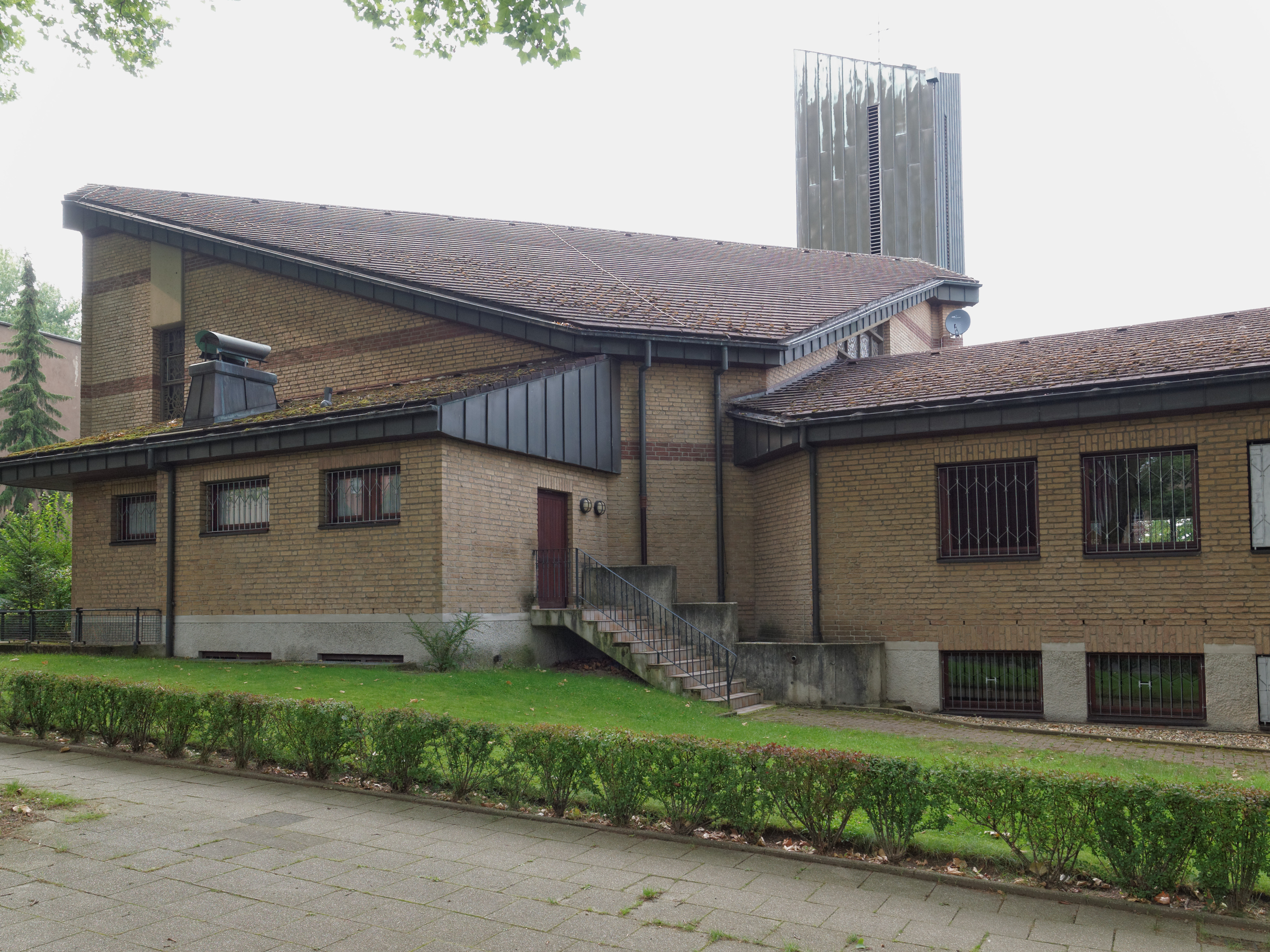 Die Kirche der katholischen Gemeinde St. Joseph in Herne, Roonstraße, erbaut 1984, rechts Gemeinderäume, Ansicht von der Luisenstraße (SSE)